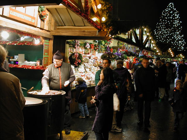 „Maronibrater" am Wiener Christkindlmarkt